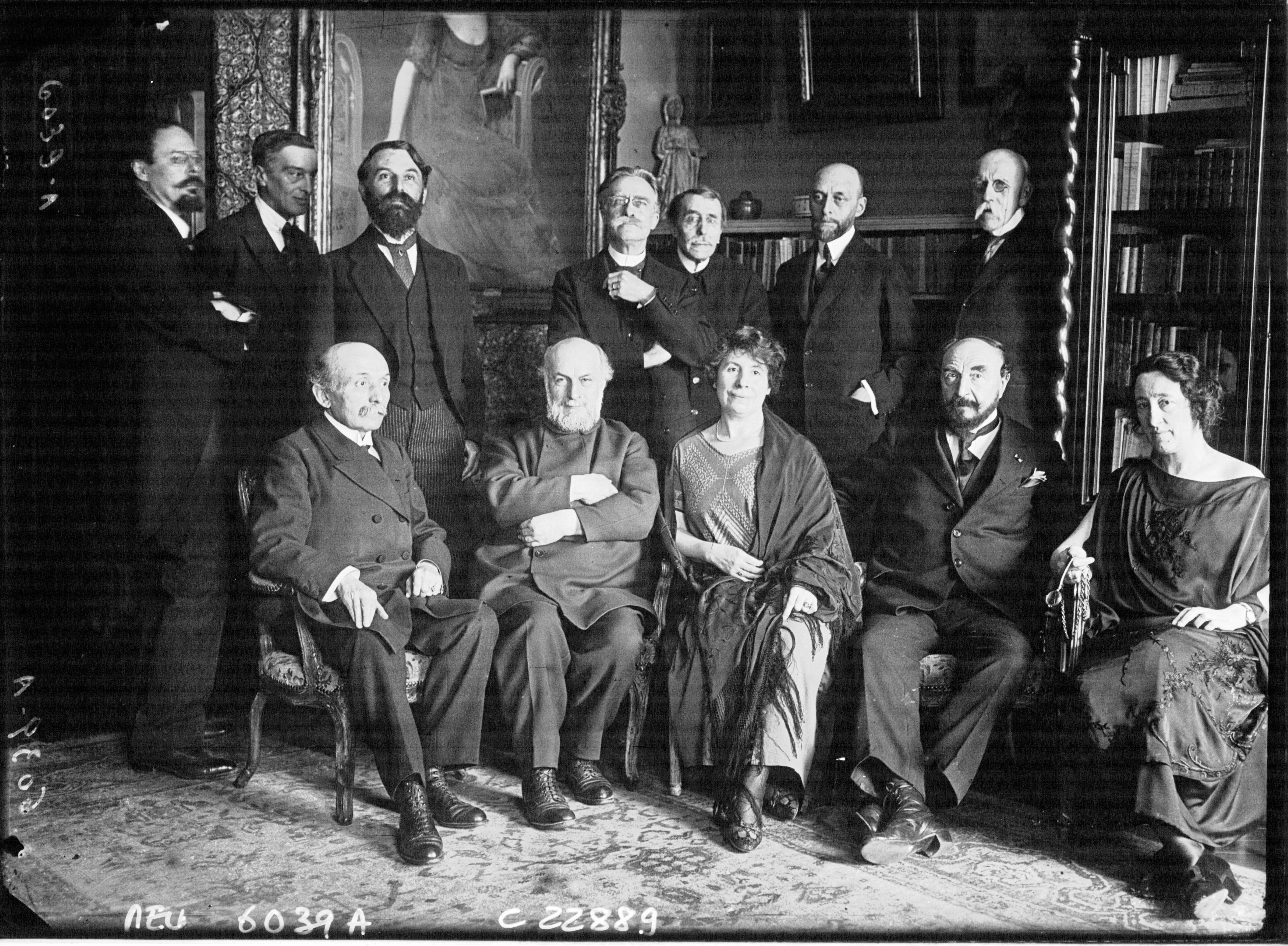 Réunion du jury du Grand Prix Flaubert de Littérature chez la romancière Marcelle Tinayre (1870-1948), assise au centre, en 1923. Les membres du jury sont : Judith Cladel, Henri de Régnier, René Boylesve, Élémir Bourges, J.-H. Rosny aîné, Antoine Bourdelle, Sébastien-Charles Leconte, Marius et Ary Leblond, Jean Royère et Gilbert de Voisins.